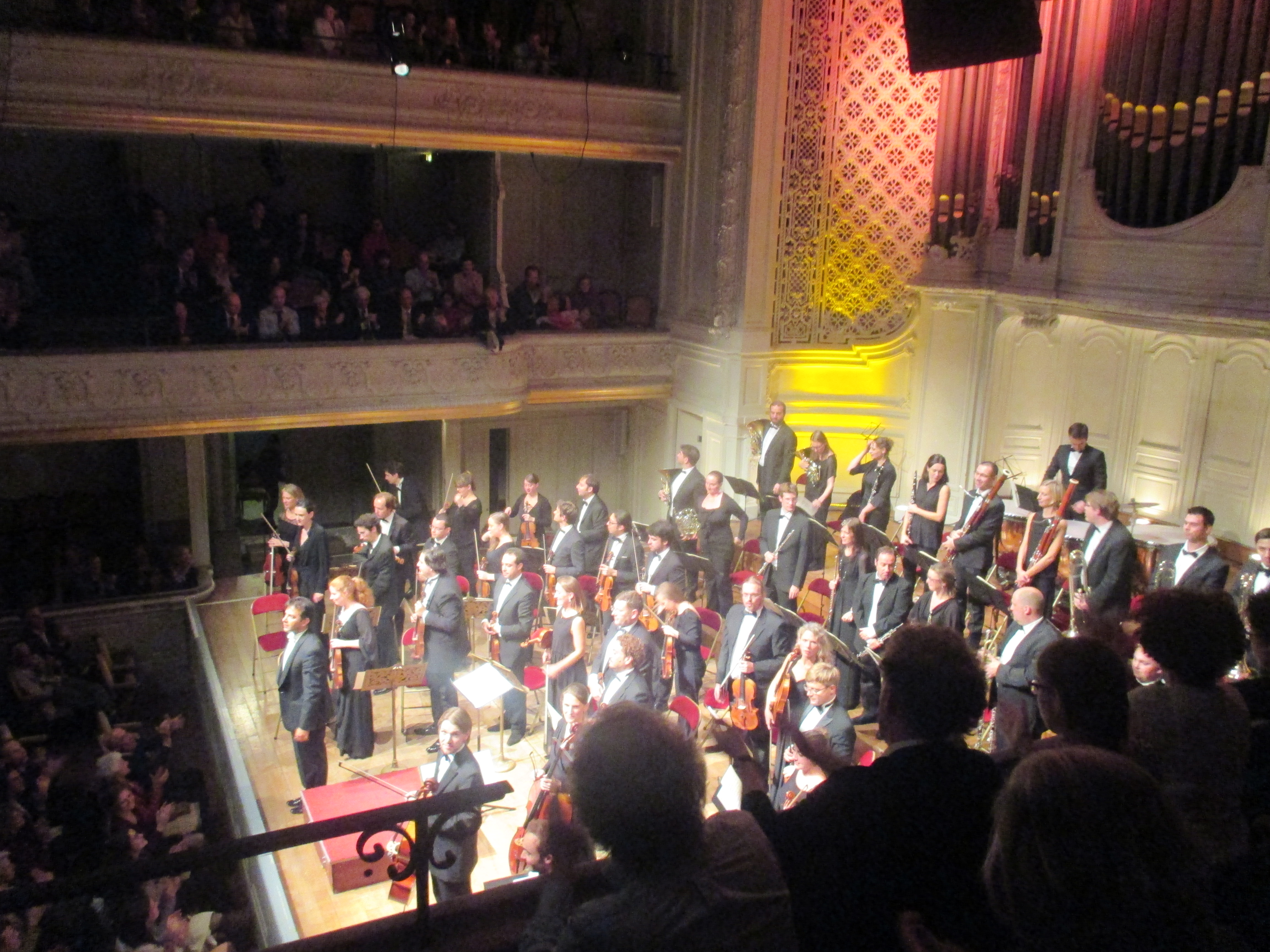 Orchestre de l'Alliance à Paris, salle Gaveau, le 1er octobre 2015, dirigé par Pejman Memarzadeh.